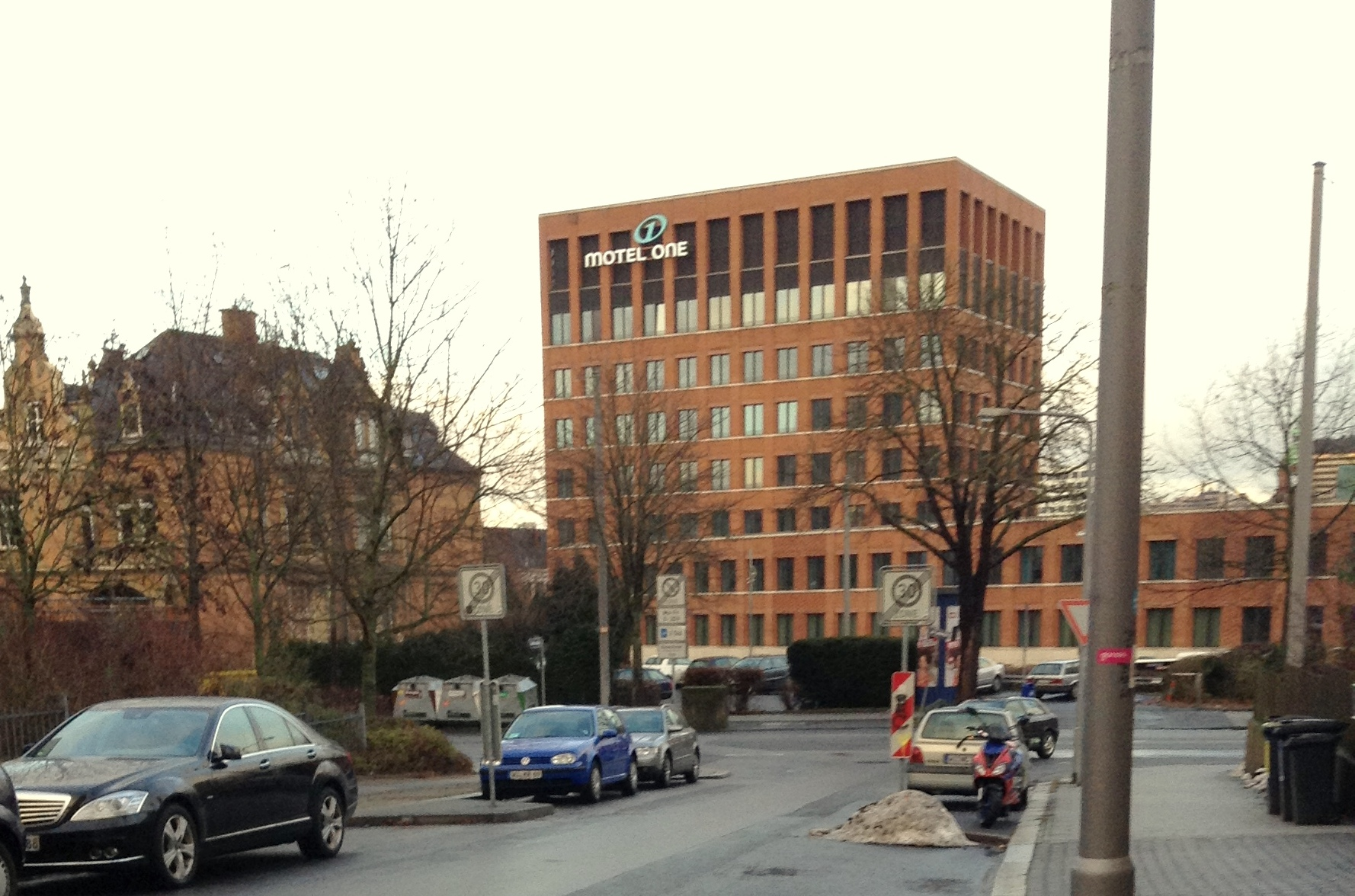 Das Motel One in Wiesbaden